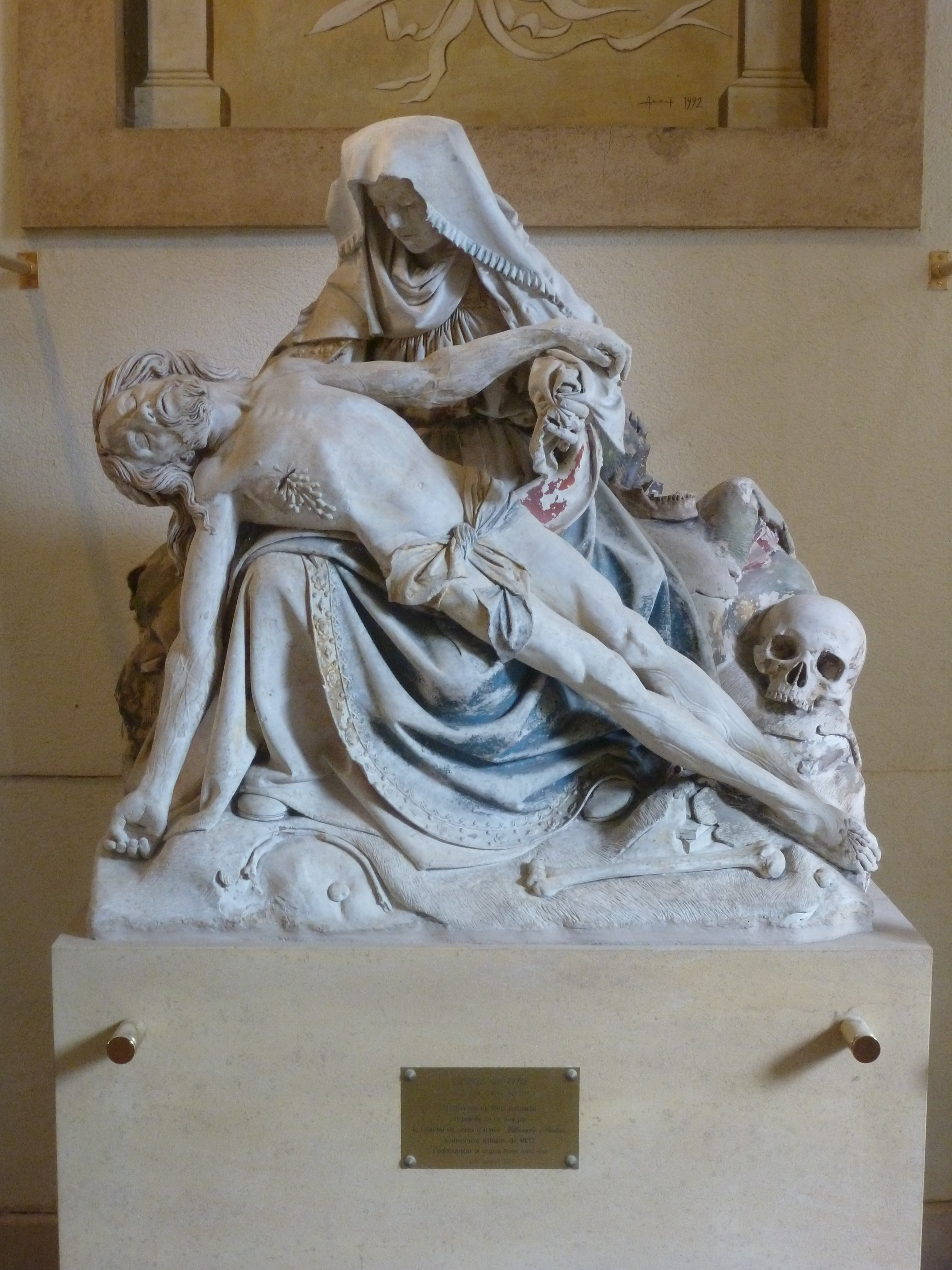 Pieta à l’ancienne abbaye de Saint-Arnould à Metz (Moselle, Lorraine, France).